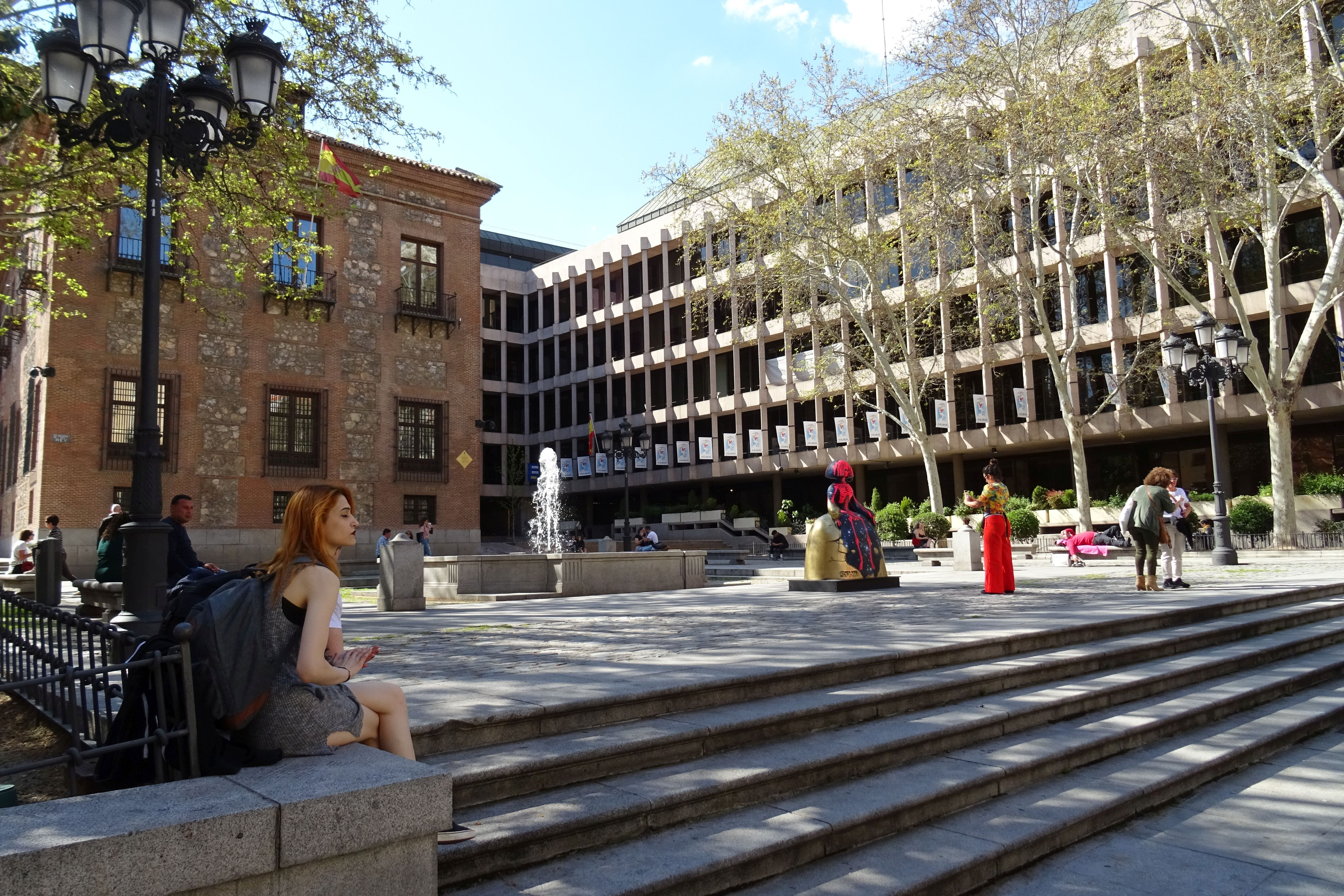 20180418 65 Madrid - Plaza del Rey